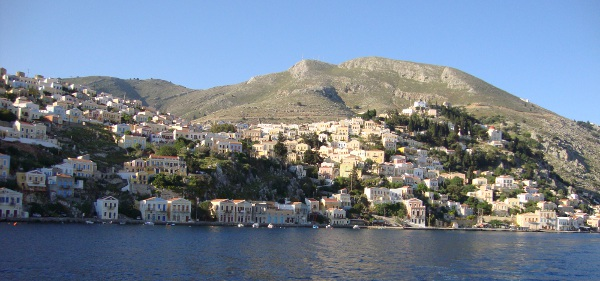 Άποψη της Σύμης από την είσοδο του λιμανιού